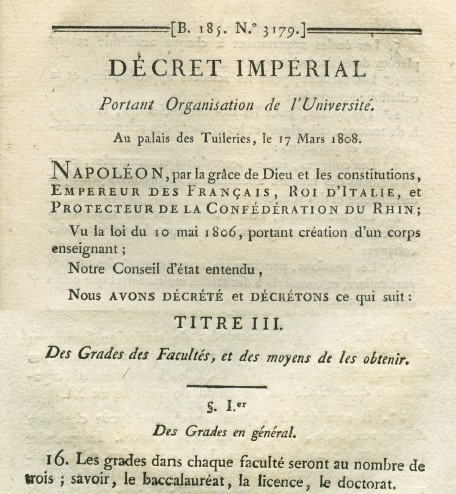 Décret organisant l'université et créant le baccalauréat